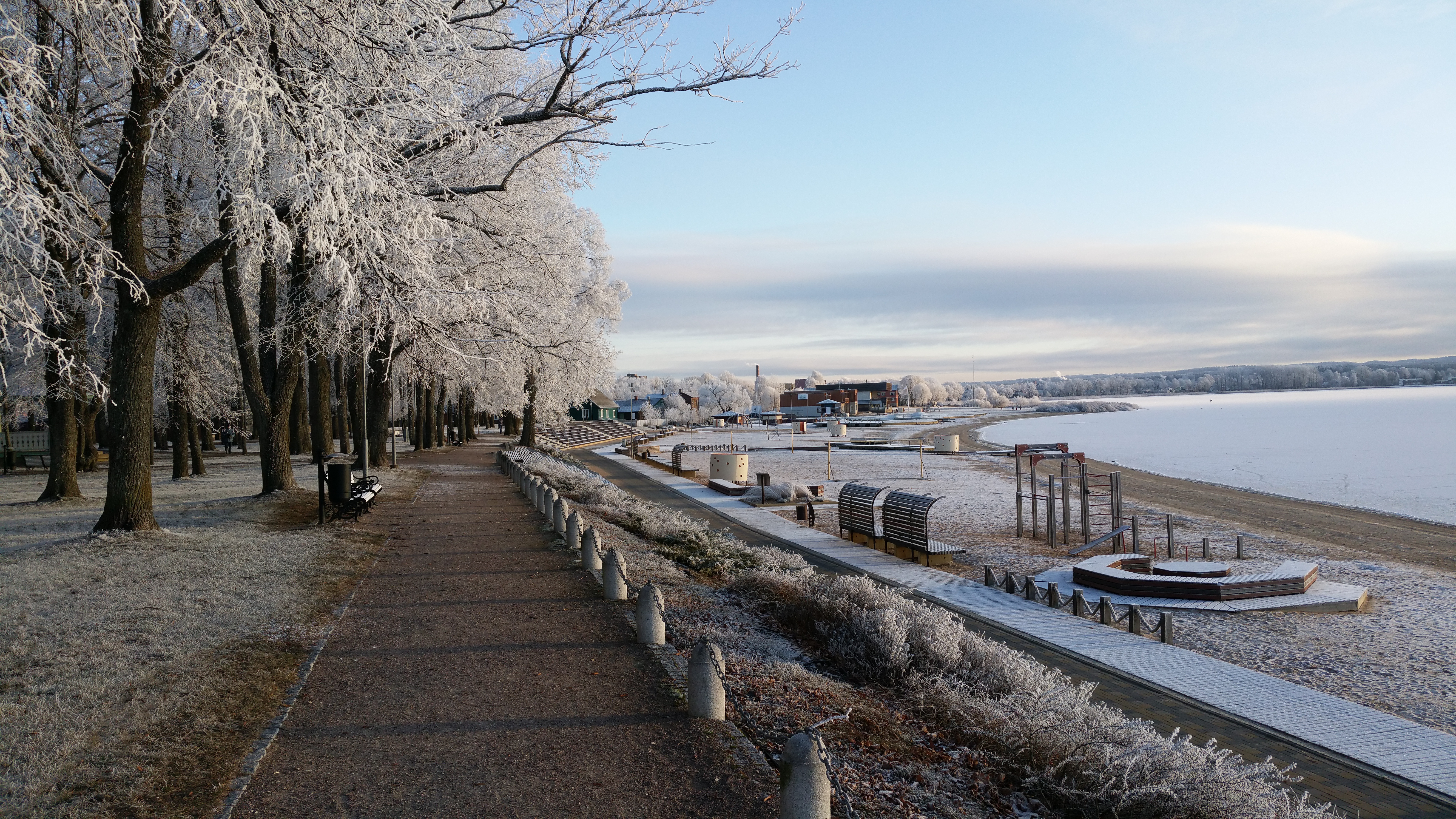 Kreutzwaldi park